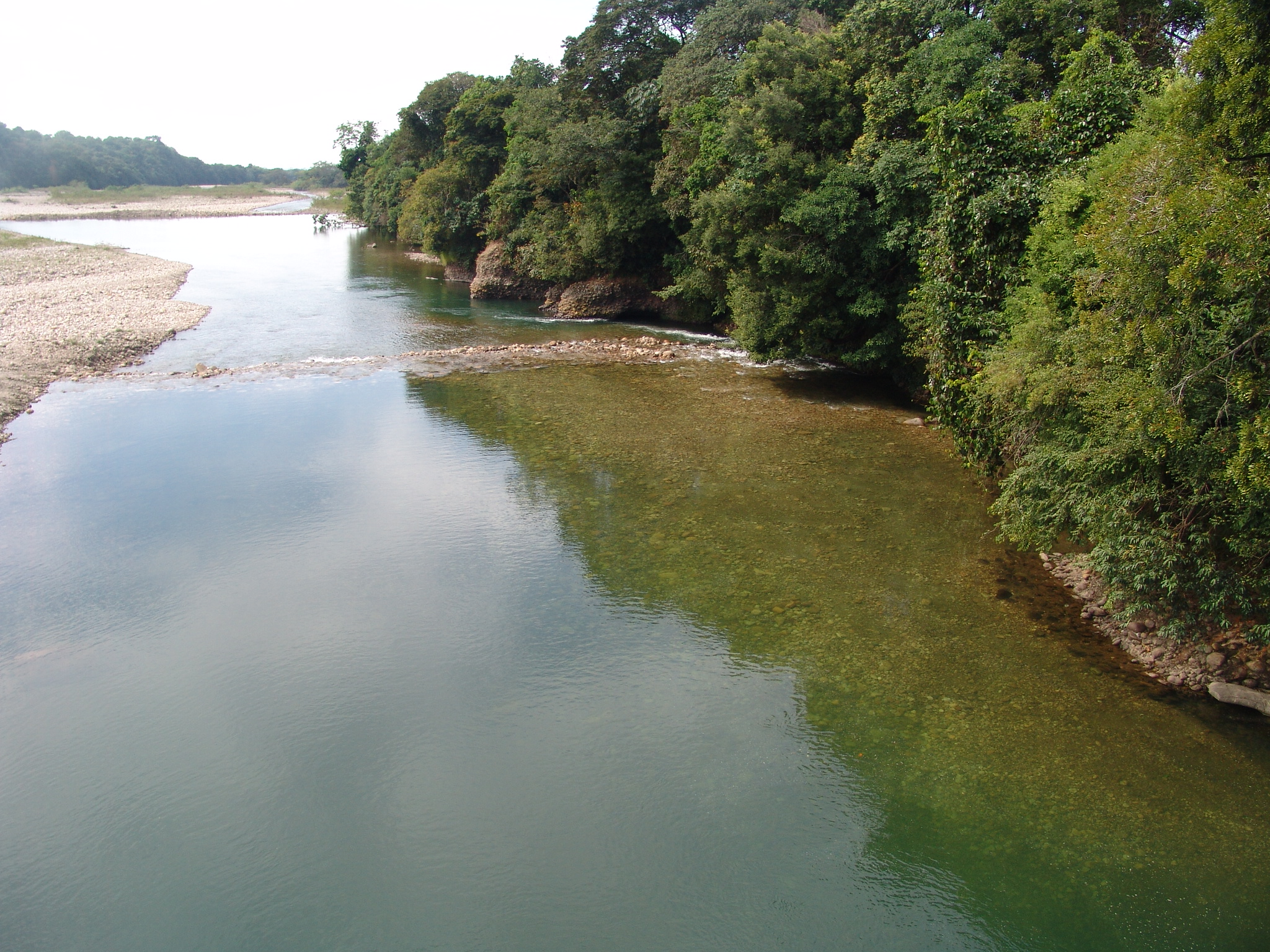 rio Tùa